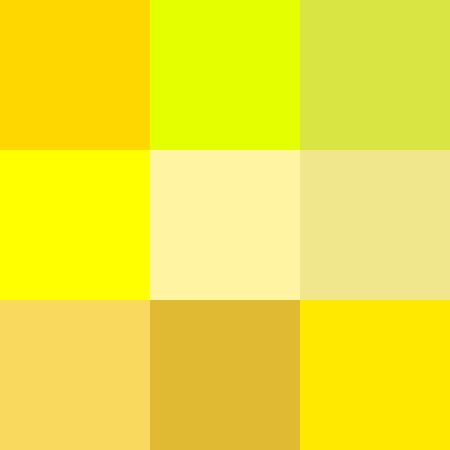 Mosaico de amarillos: dorado / lima-limón / chartreuse o limón amarillo puro / crema / caqui amarillo Nápoles / amarillo ocre / amarillo estándar